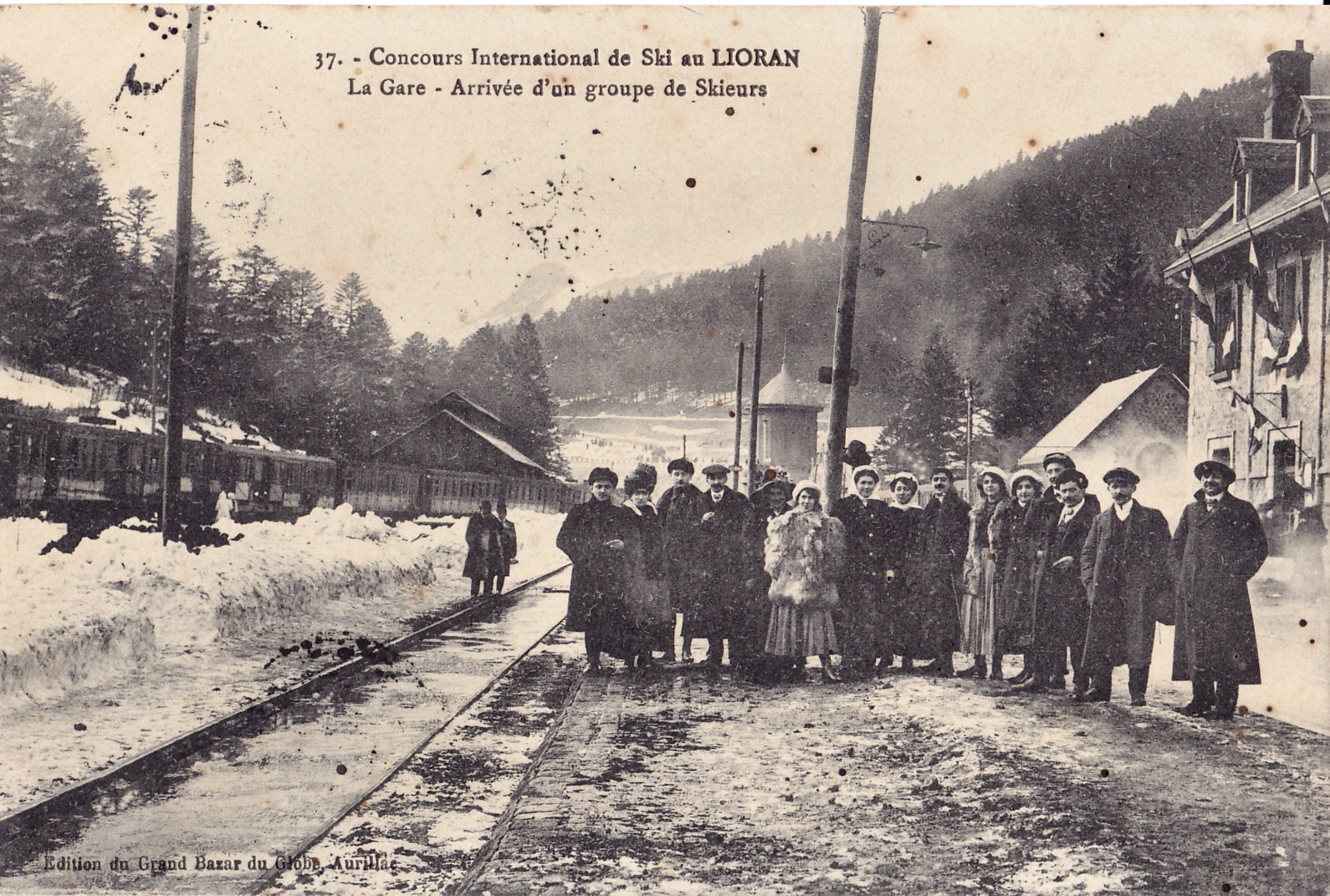 Carte postale ancienne éditée par le Grand Bazar du Globe à Aurillac, collection Concours international de Ski du LIORAN : La Gare - Arrivée d'un groupe de skieurs